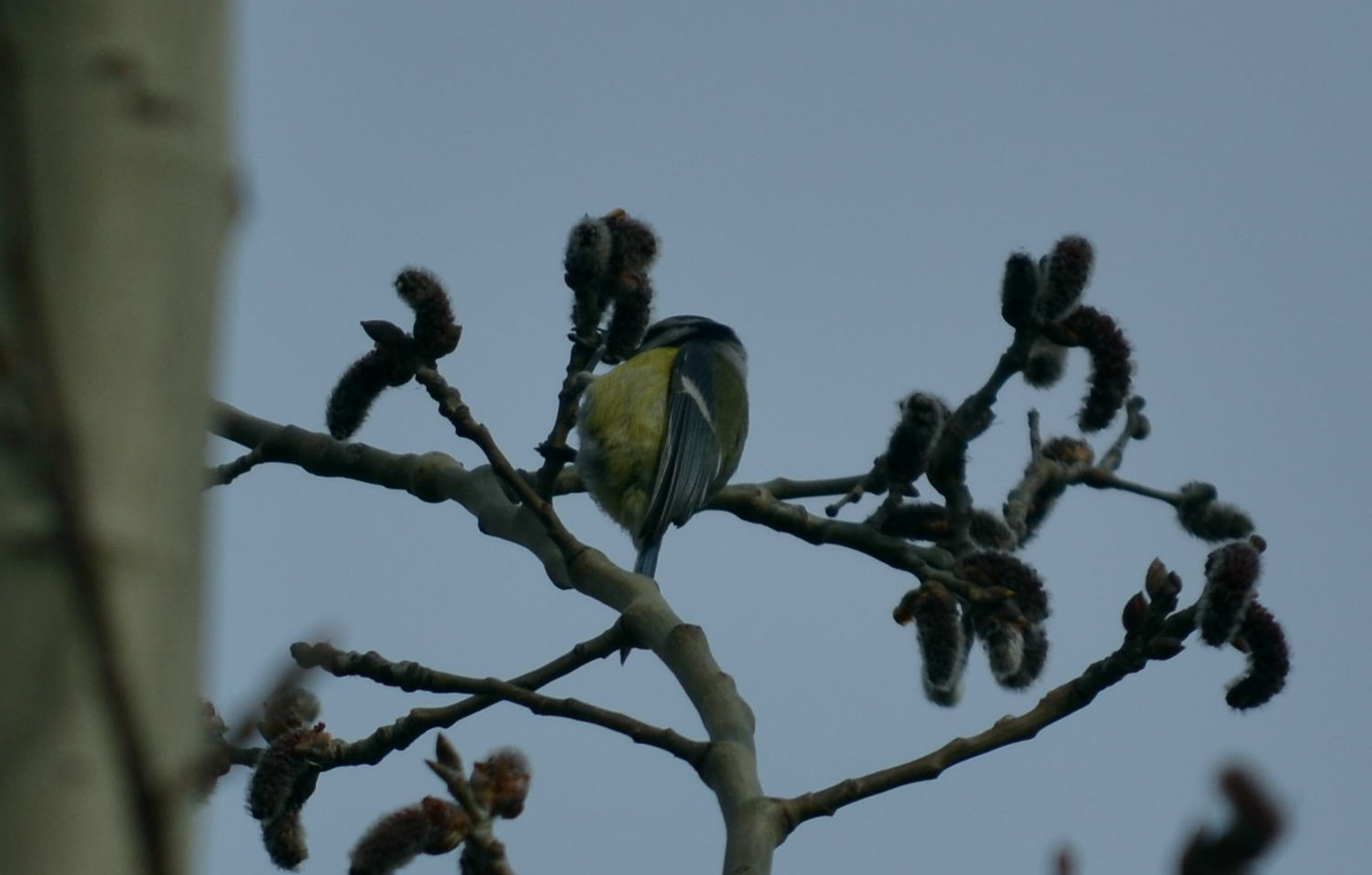 Лазоревка обыкновенная (Cyanistes caeruleus) питается соцветиями (серёжками) осины (Populus tremula). Фото сделано около Ростова-на-Дону, на берегу Гребного канала.